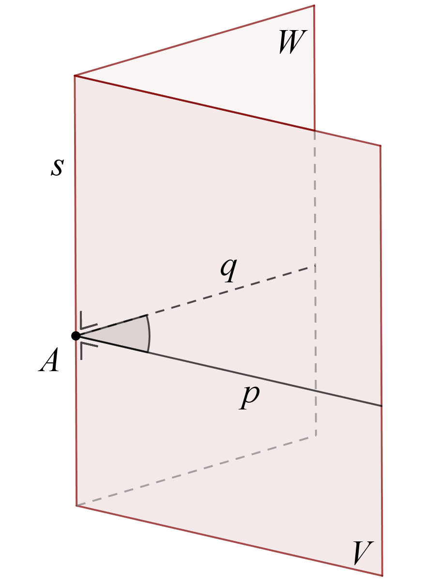 Tweevlakshoek met standhoek